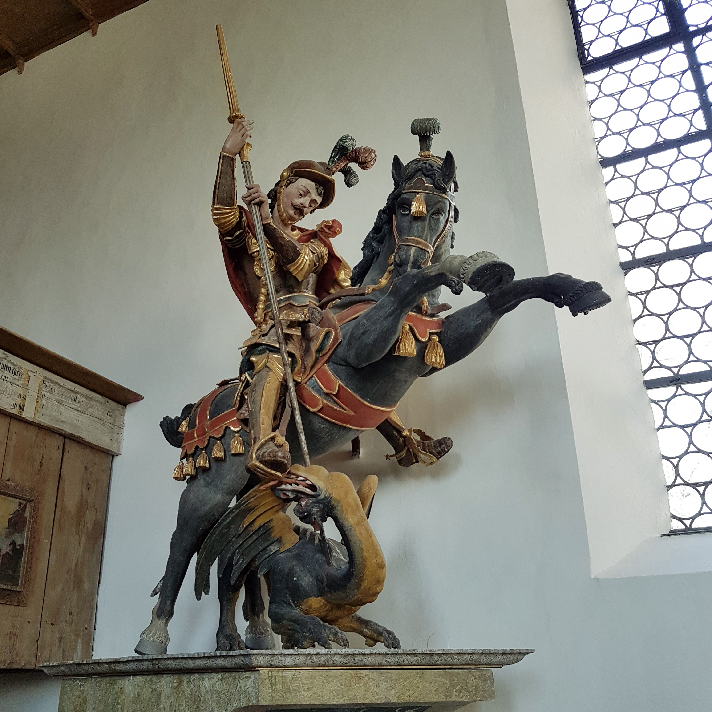 St. Georg (Auerberg), monumentale frühbarocke Georgsfigur.